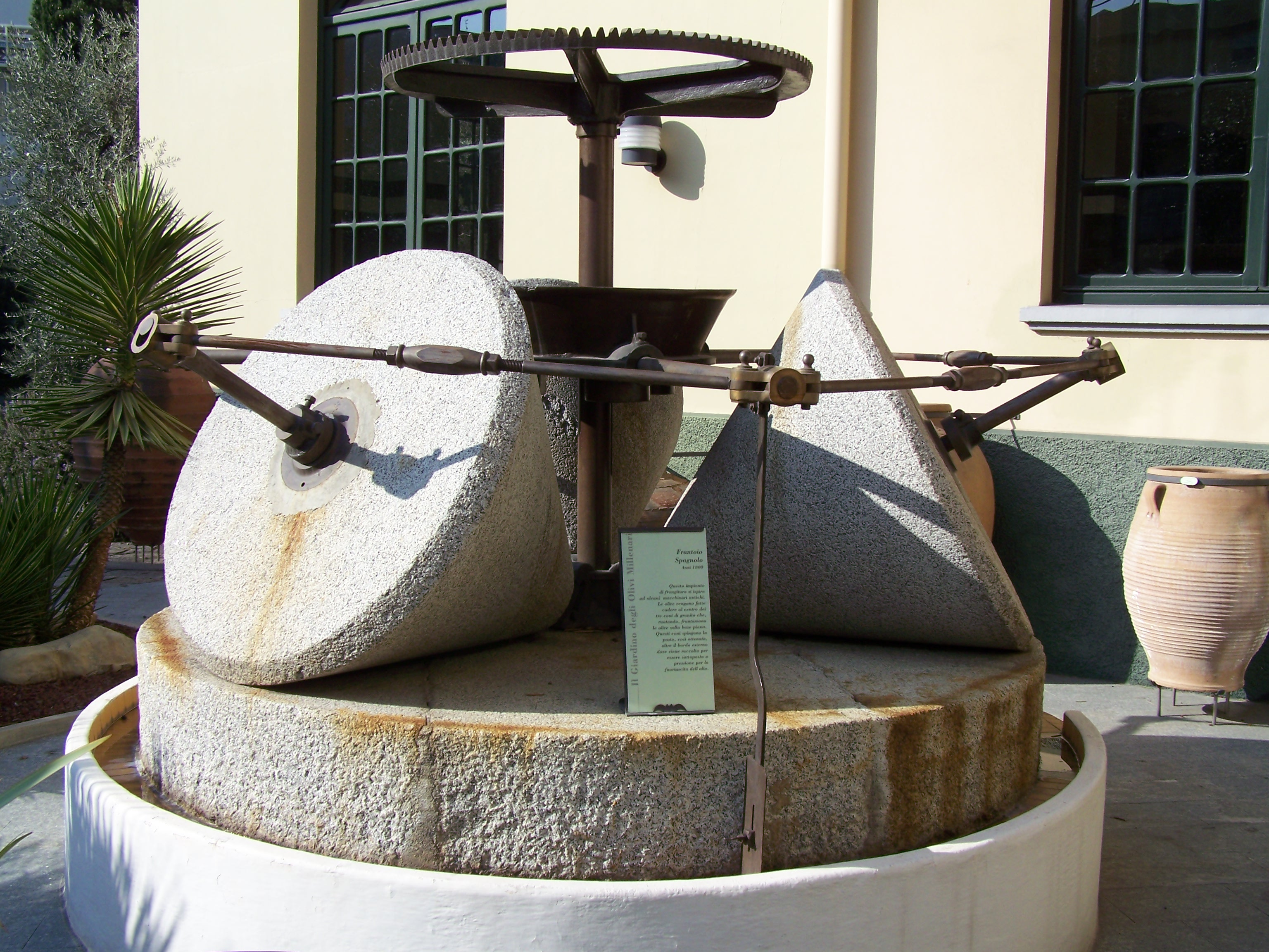 Meules coniques à olives (Espagne, XIX° siècle), exposées dans le jardin du Museo Dell'Olivo (Imperia, Italie)